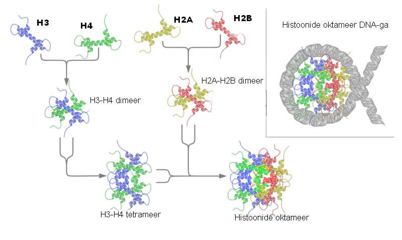 Nukleosoomi tuumik koosneb histoonidest H2A, H2B, H3 ja H4. Pildil on kujutatud dimeeride ja tetrameeride moodustumine.